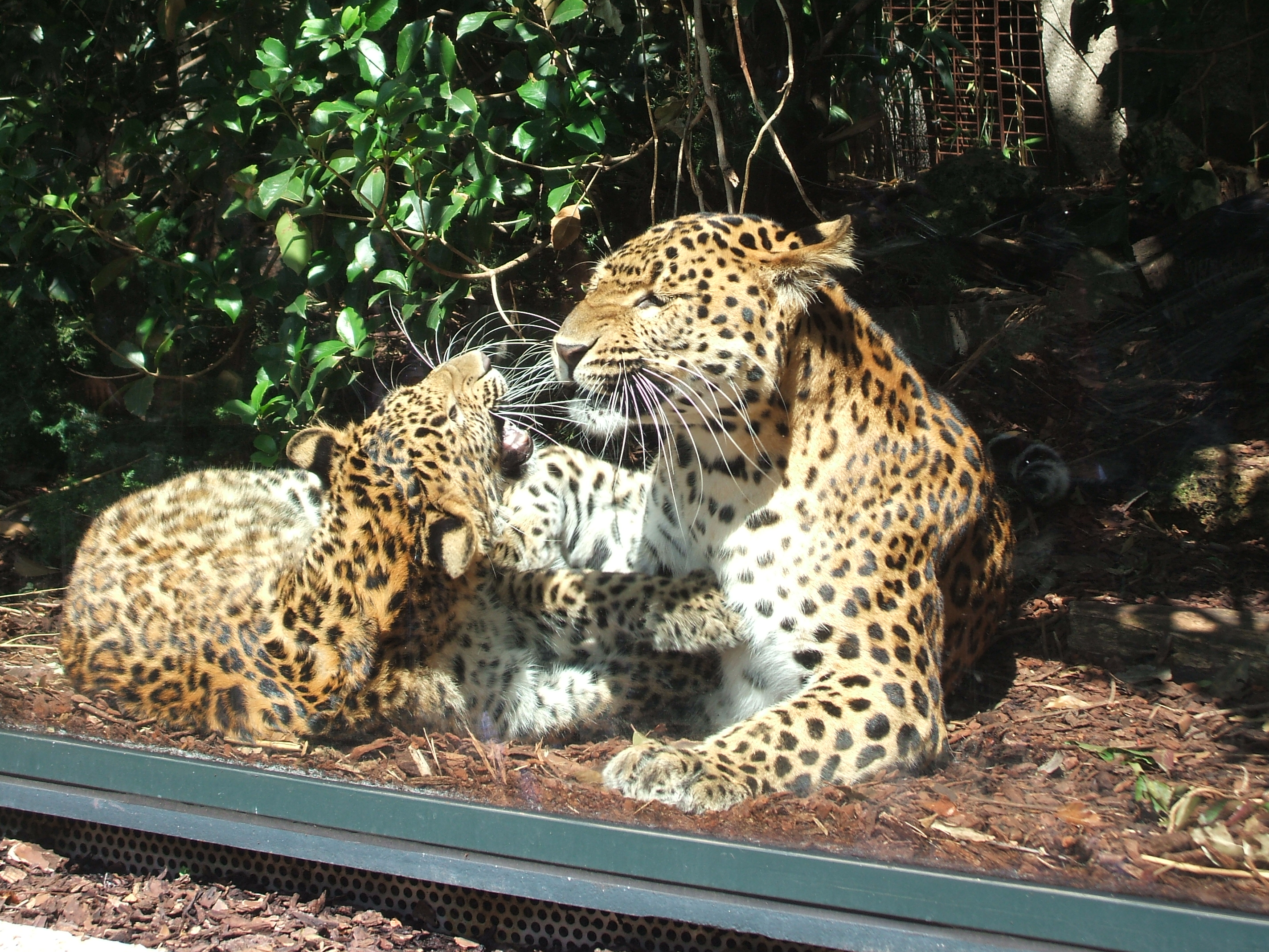 Panthère de Chine jouant avec son petit, Ménagerie du Jardin des Plantes, août 2009.